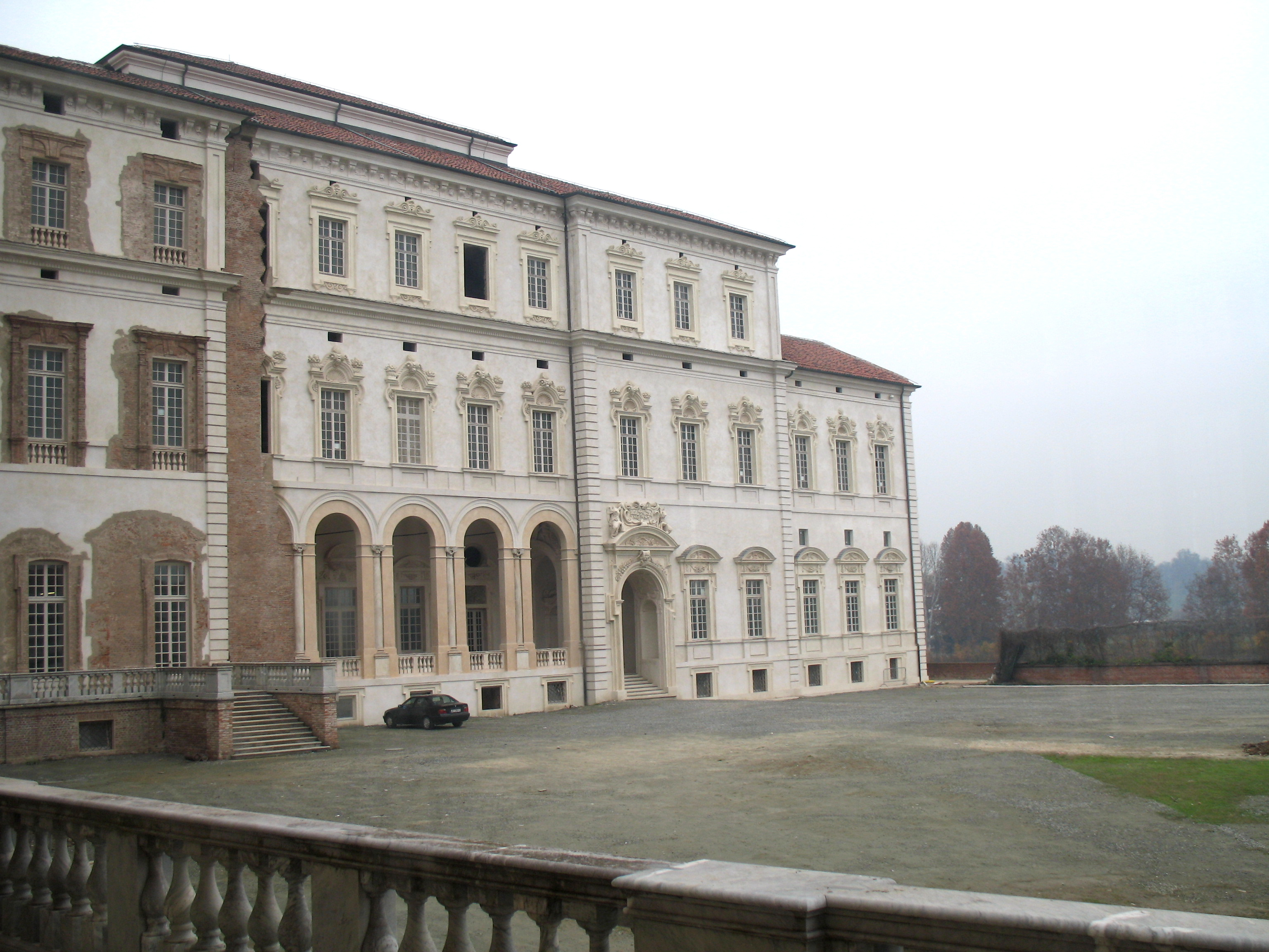 Venaria Reale - Esterni e parco Reggia.